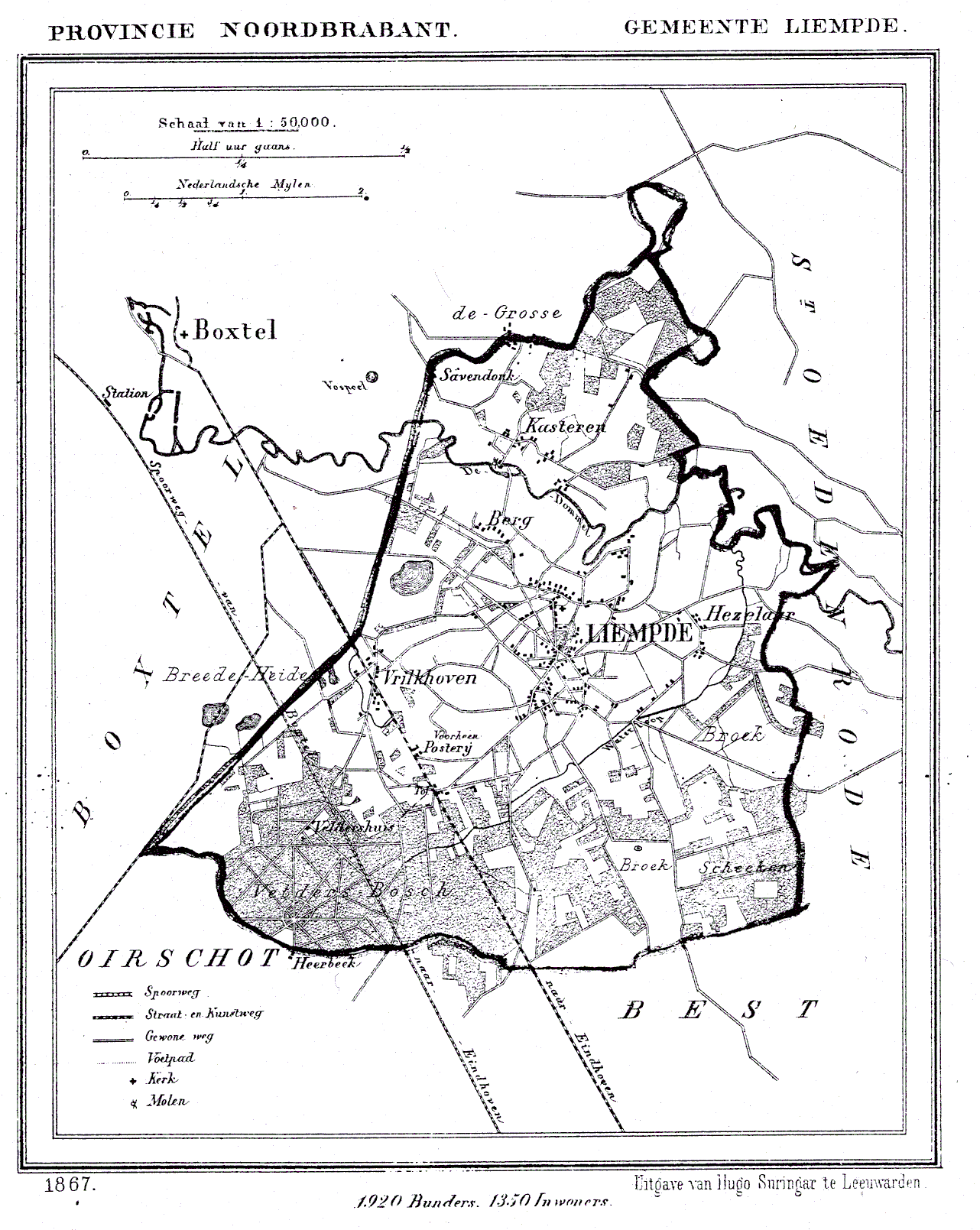 Nederland, Noord-Brabant, Gemeente Liempde